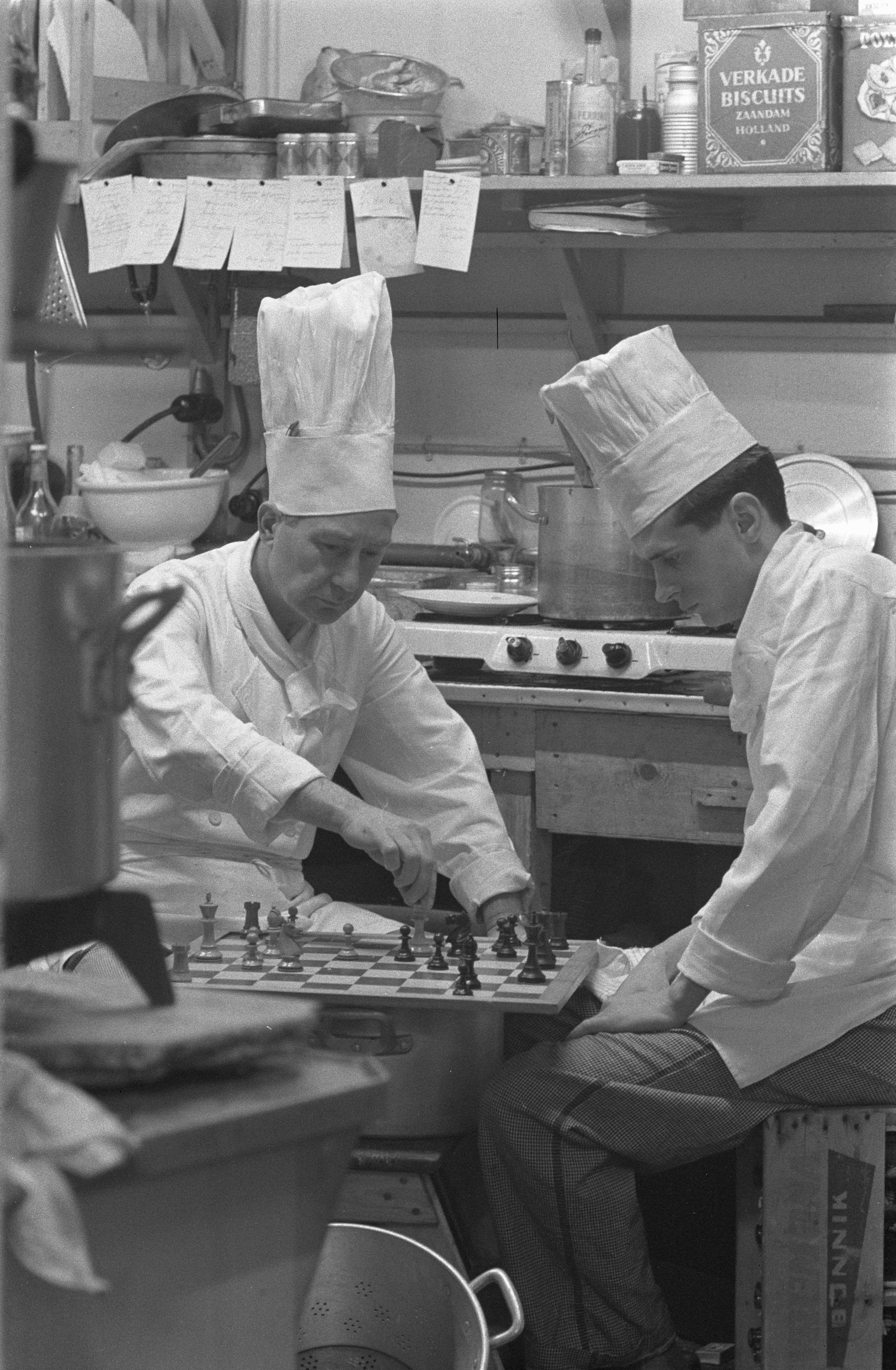 Collectie / Archief : Fotocollectie Anefo Reportage / Serie : [ onbekend ] Beschrijving : Hoogovenschaaktoernooi te Beverwijk, koks zijn ook aan het schaken Datum : 12 januari 1960 Locatie : Beverwijk Trefwoorden : koks, schaken, sport Instellingsnaam : Hoogovenschaaktournooi Fotograaf : Pot, Harry / Anefo Auteursrechthebbende : Nationaal Archief Materiaalsoort : Negatief (zwart/wit) Nummer archiefinventaris : bekijk toegang 2.24.01.05 Bestanddeelnummer : 910-9357